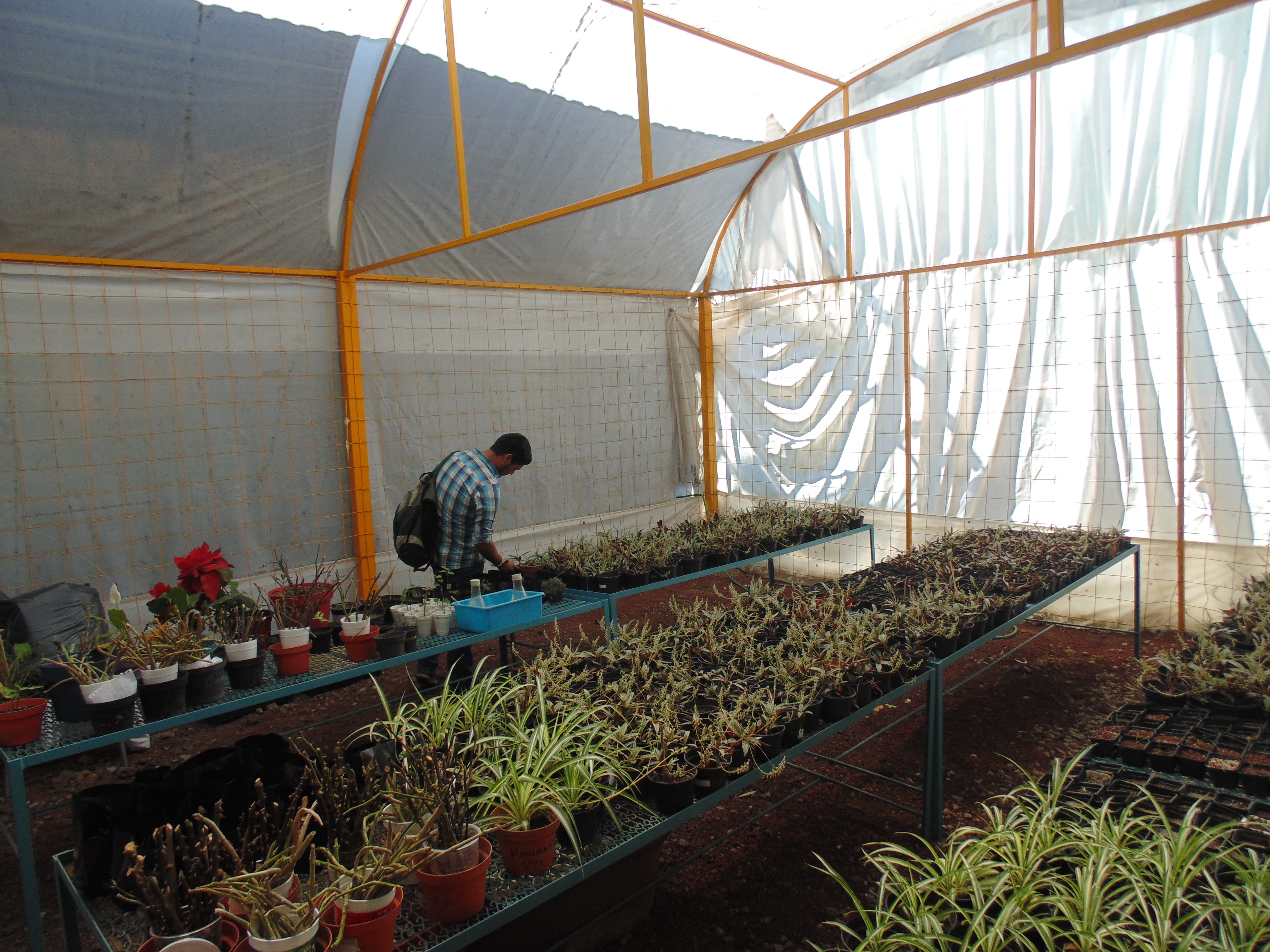 Inverdadero CCH Azcapotzalco.